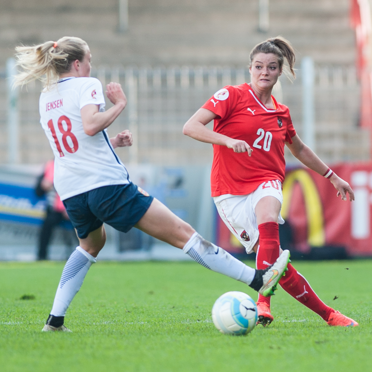 Steyr, Austria, 10.04.2016, ÖFB Frauen EM-Qualifikation - Österreich vs Norwegen. Bild zeigt Synne Jensen (NOR) und Verena Aschauer (AUT).